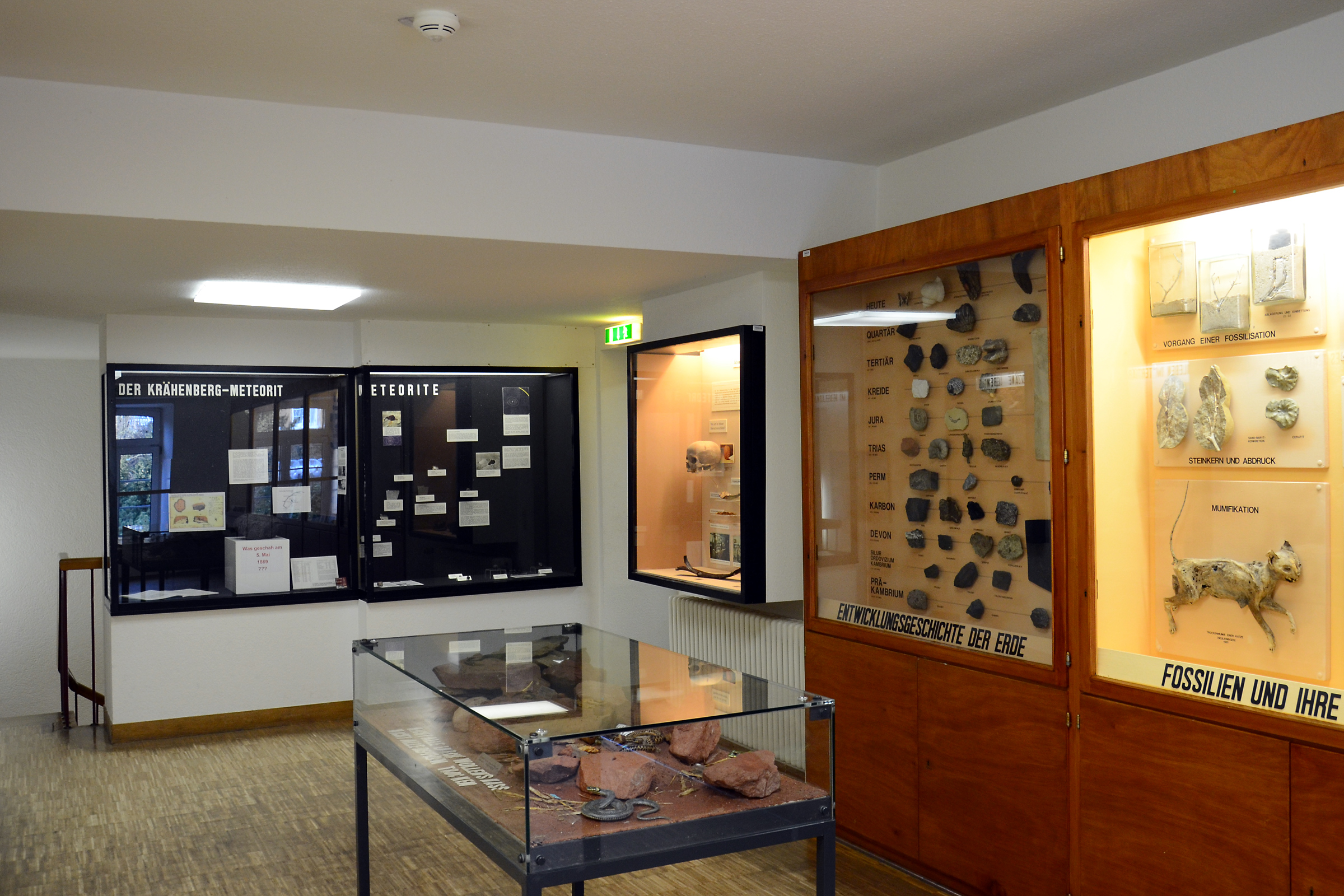 Pfalzmuseum für Naturkunde Bad Dürkheim